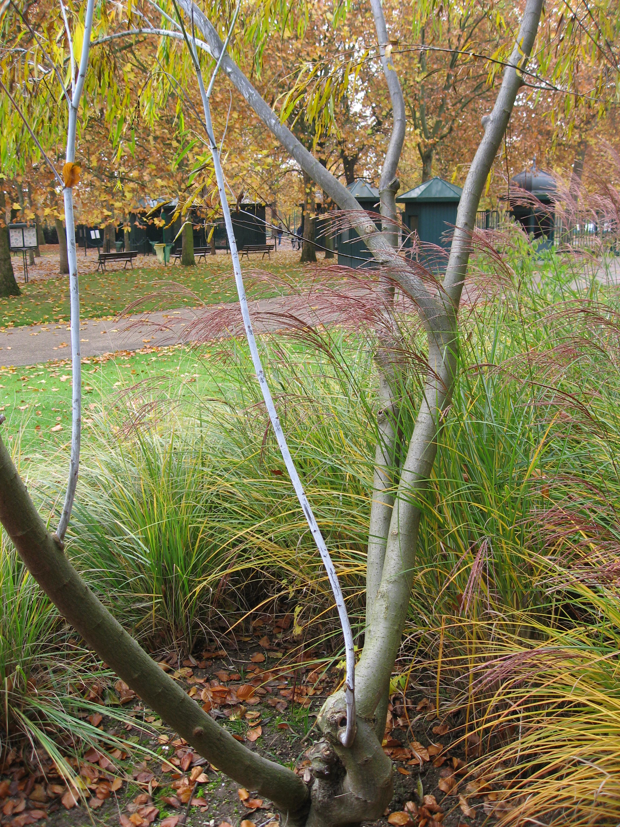 Salix udensis 'Sekka' in Parc floral de Paris Map: 48° 50' 19" N 2° 26' 33" E